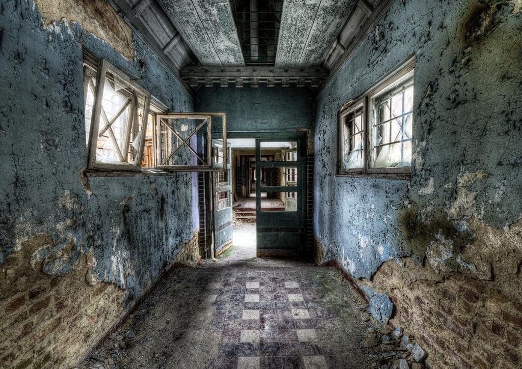 Innenaufnahme der Heistätte Grabowsee von 2013